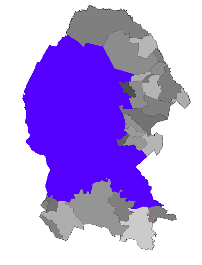 Distrito 2 Federal en Coahuila